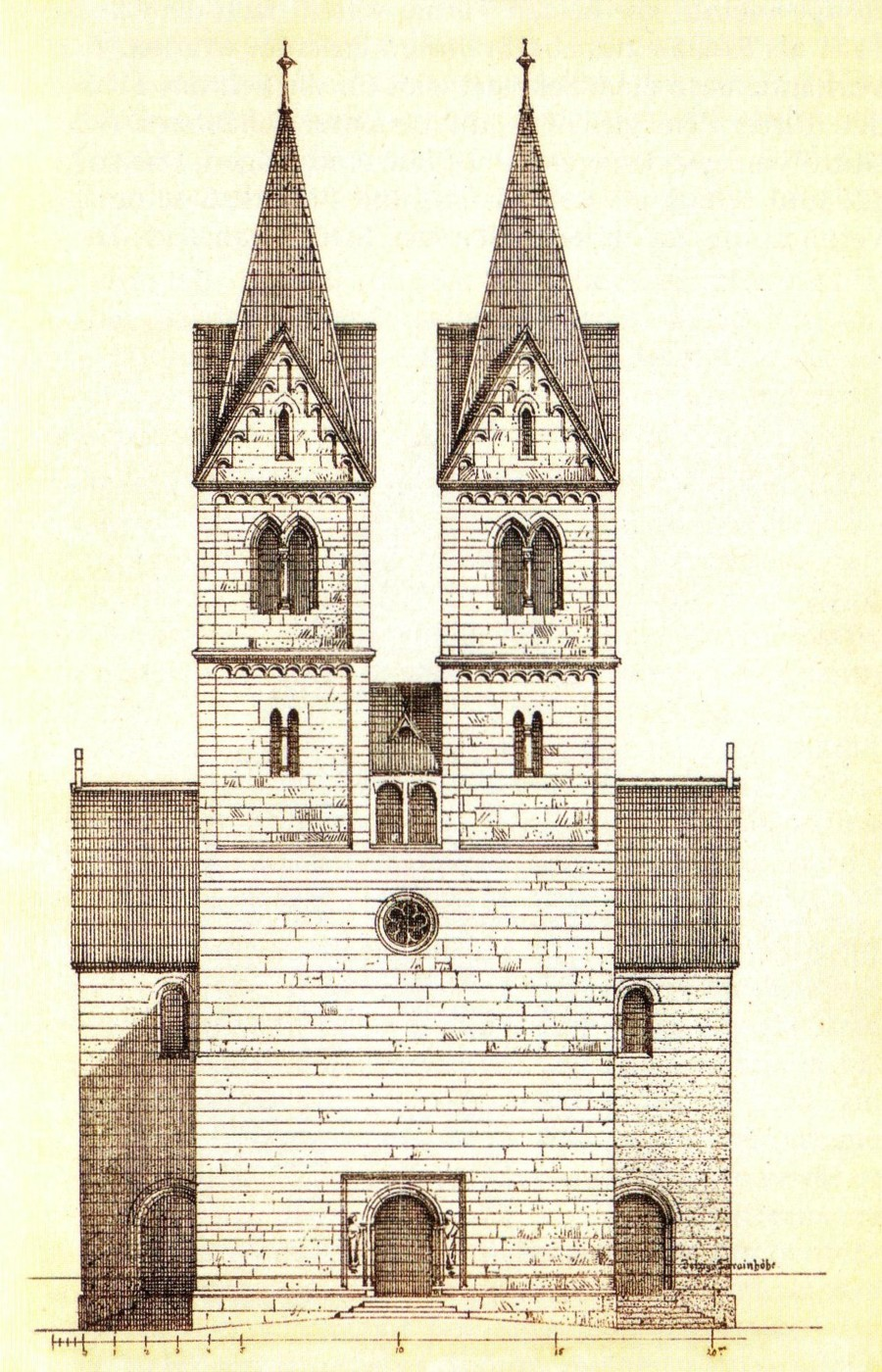 Westfront der Stadtkirche Meiningen im Jahr 1296